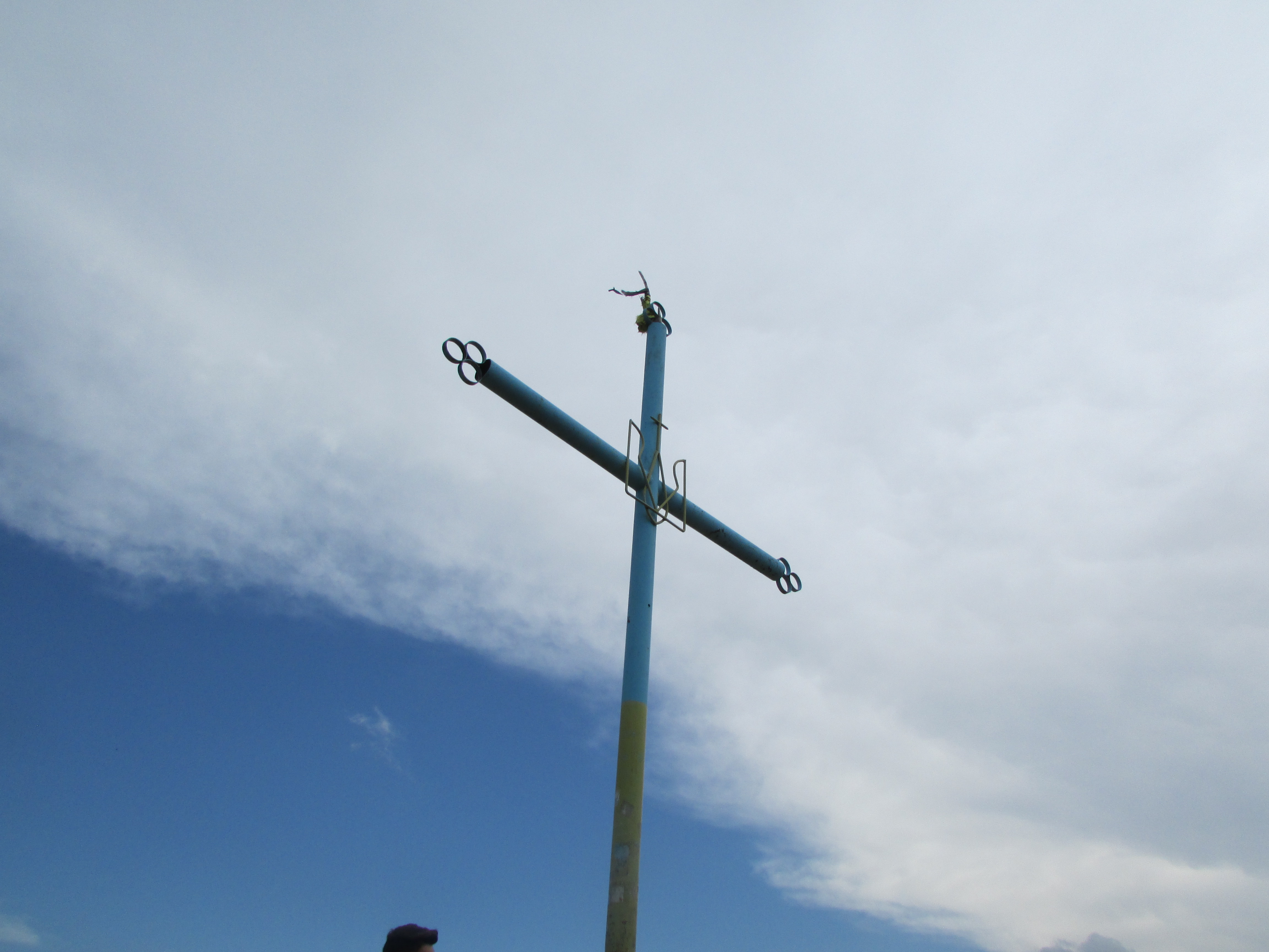 Хрест на горі Маковиця